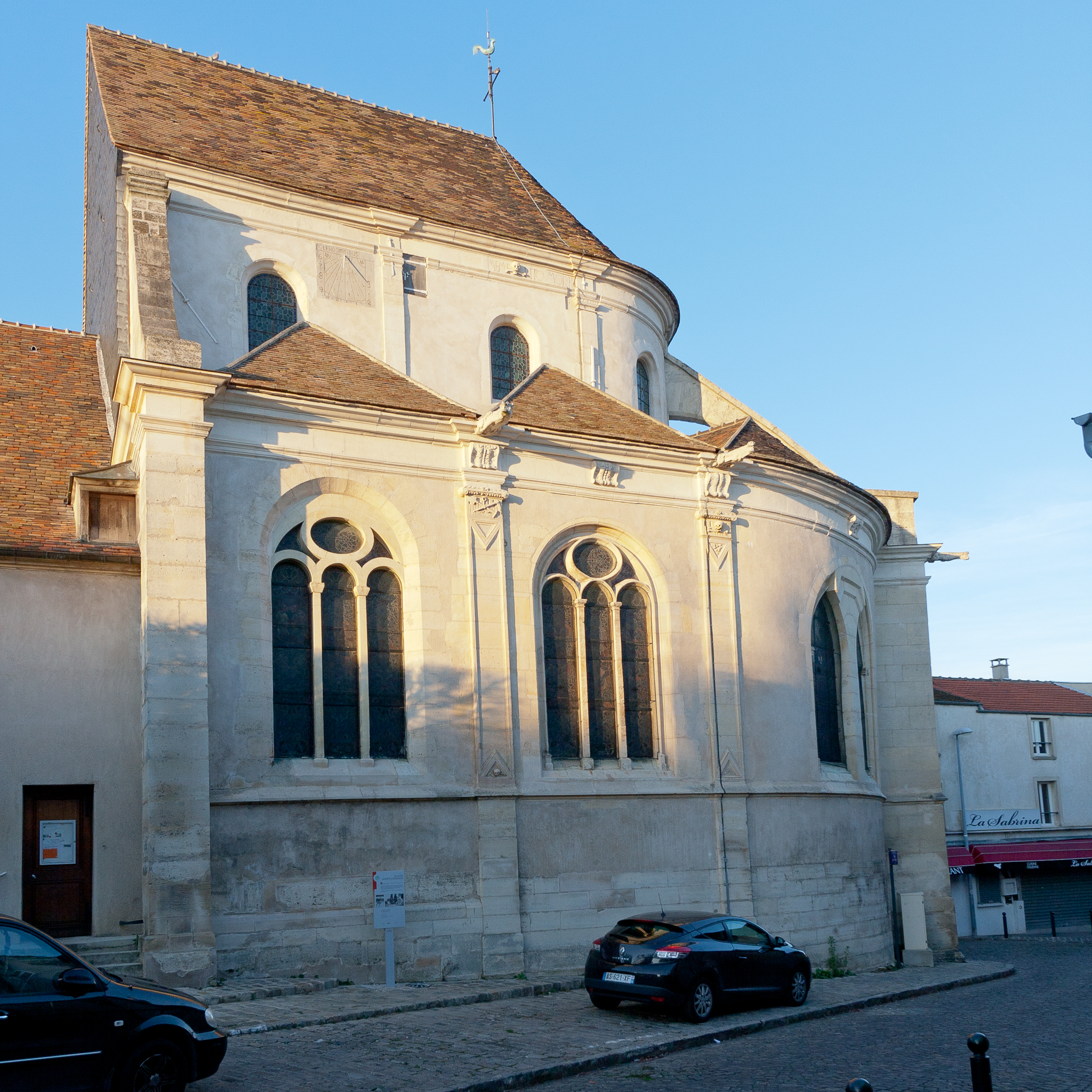 Église Saint-Germain-de-Paris, Orly.